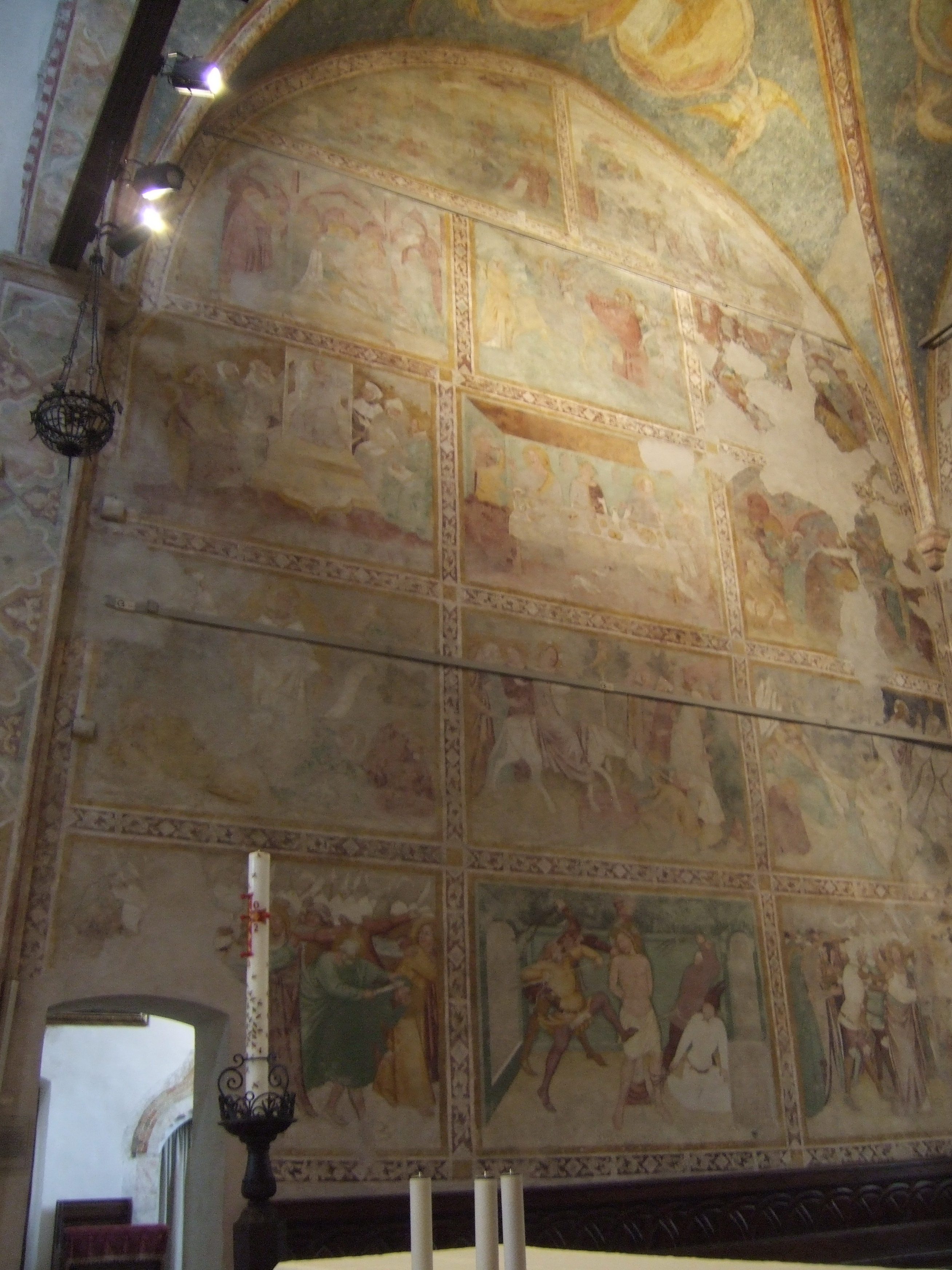 Duomo di Spilimbergo - Presbiterio - Parete destra - Affreschi del Maestro dei Padiglioni (Storie di Cristo)